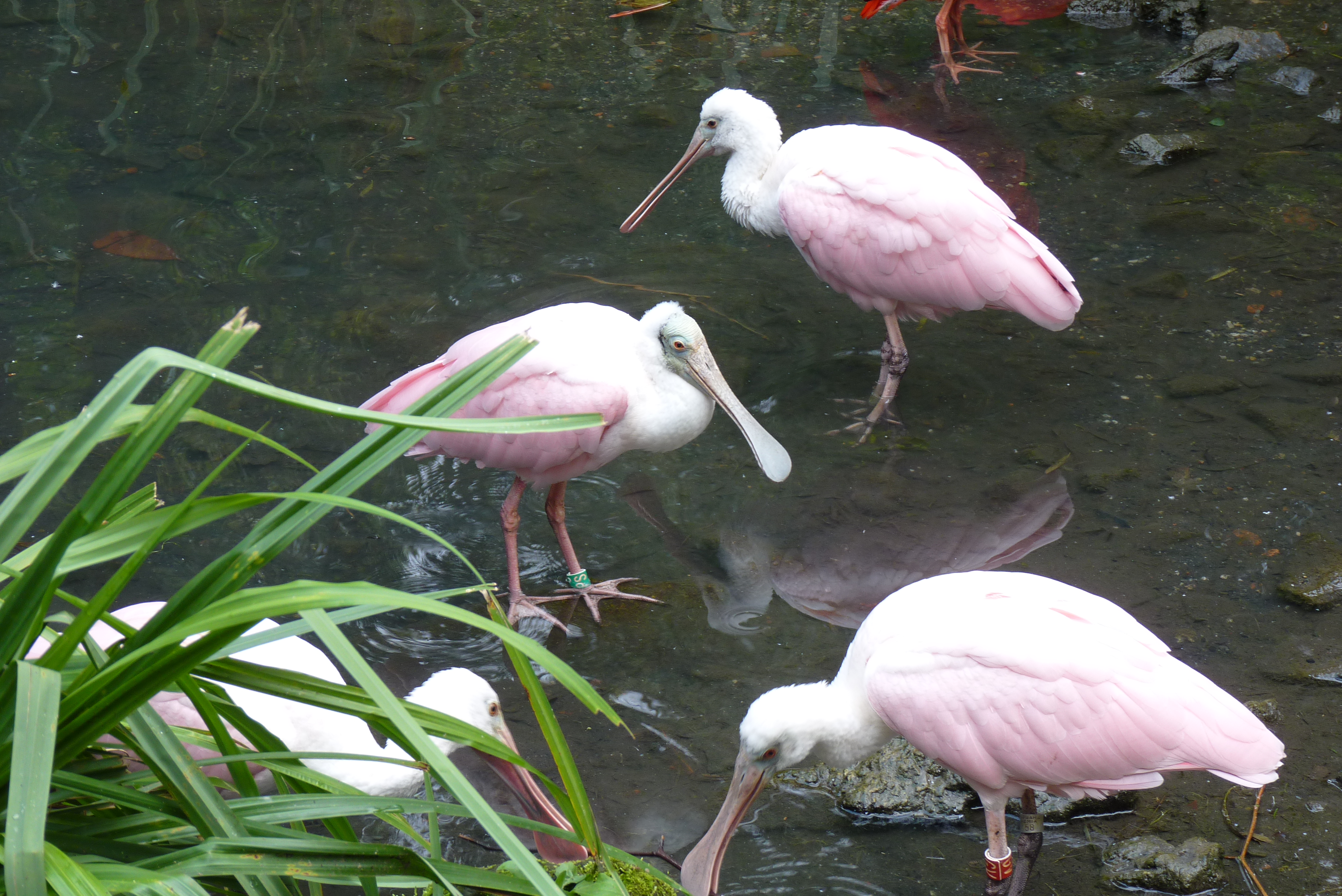 Пайри Дайза, зоопарк в Бельгии, Розовая колпица